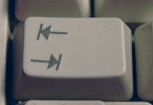 Das Aussehen der Tabulatortaste. Das Q ist da, um zu wissen wo die Taste sich normalerweise befindet.